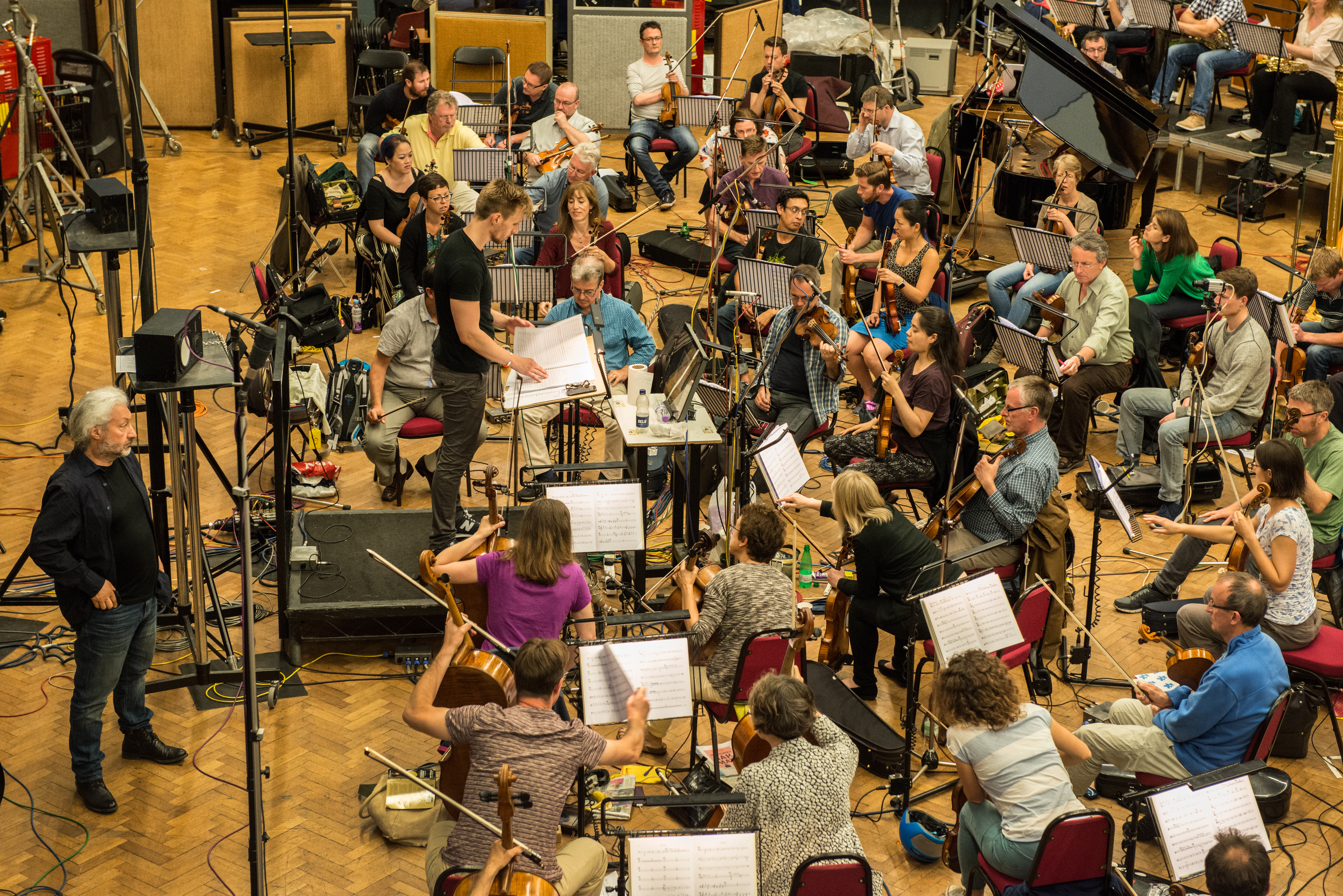 Запись симфонии Centuria S-Quark с Лондонским симфоническим оркестром на студии Abbey Road, Лондон. 2016